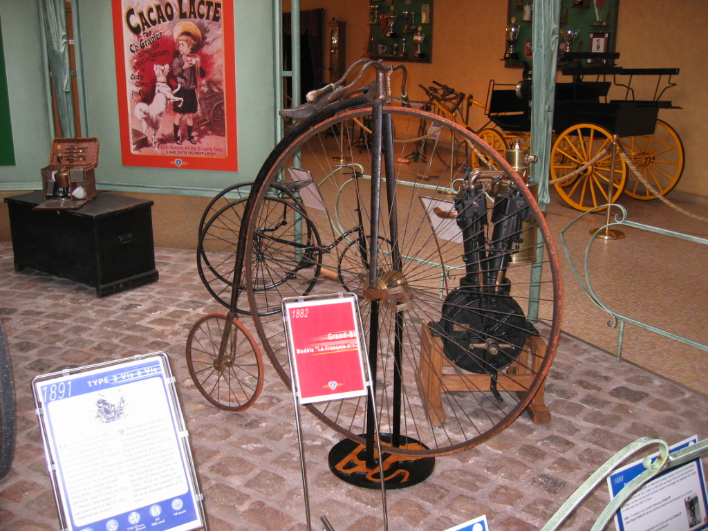 Grand bi 1882 - Modele " Le Français n°1 " - Musée Peugeot Sochaux